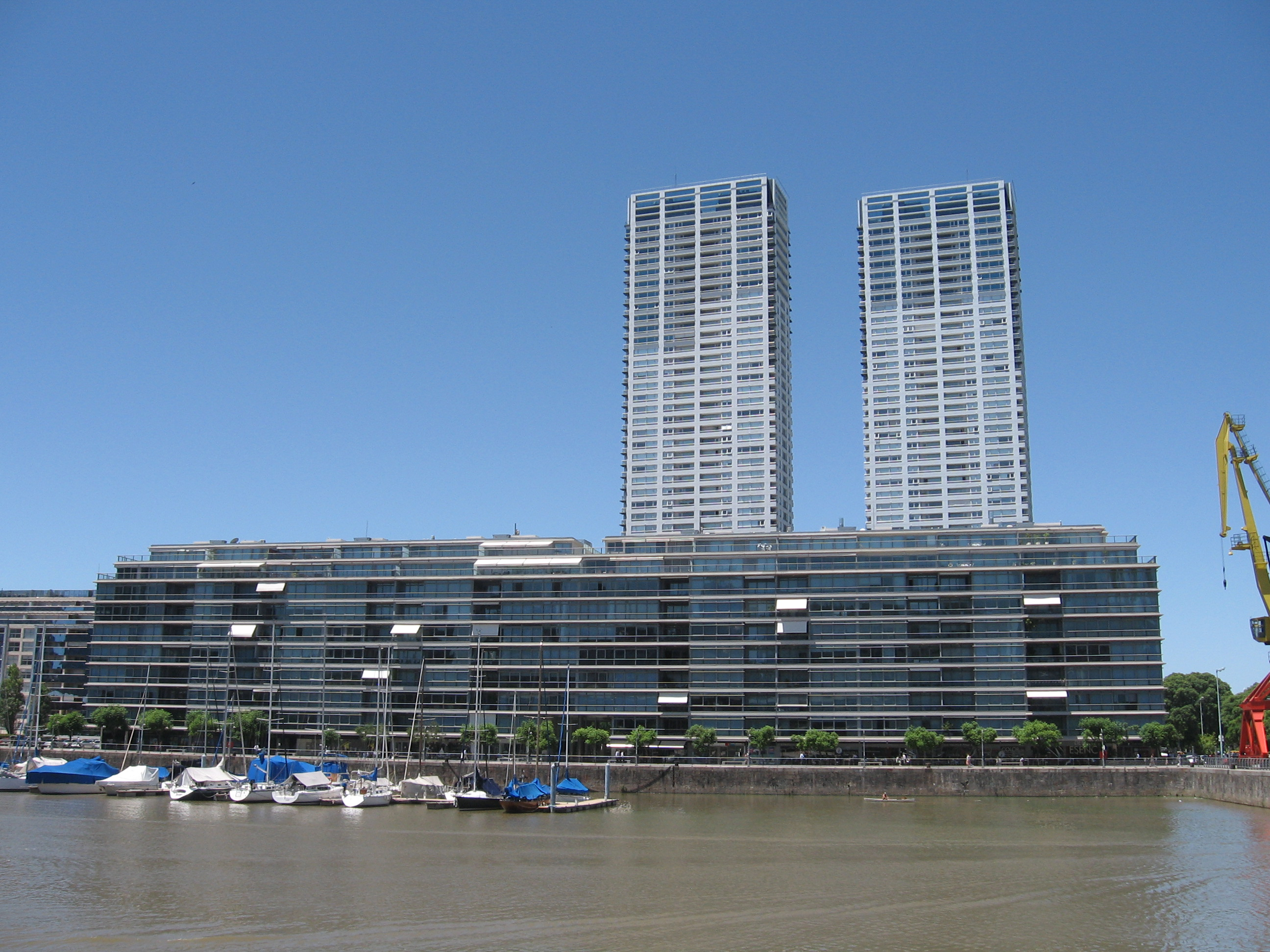 Edificio Madero Center